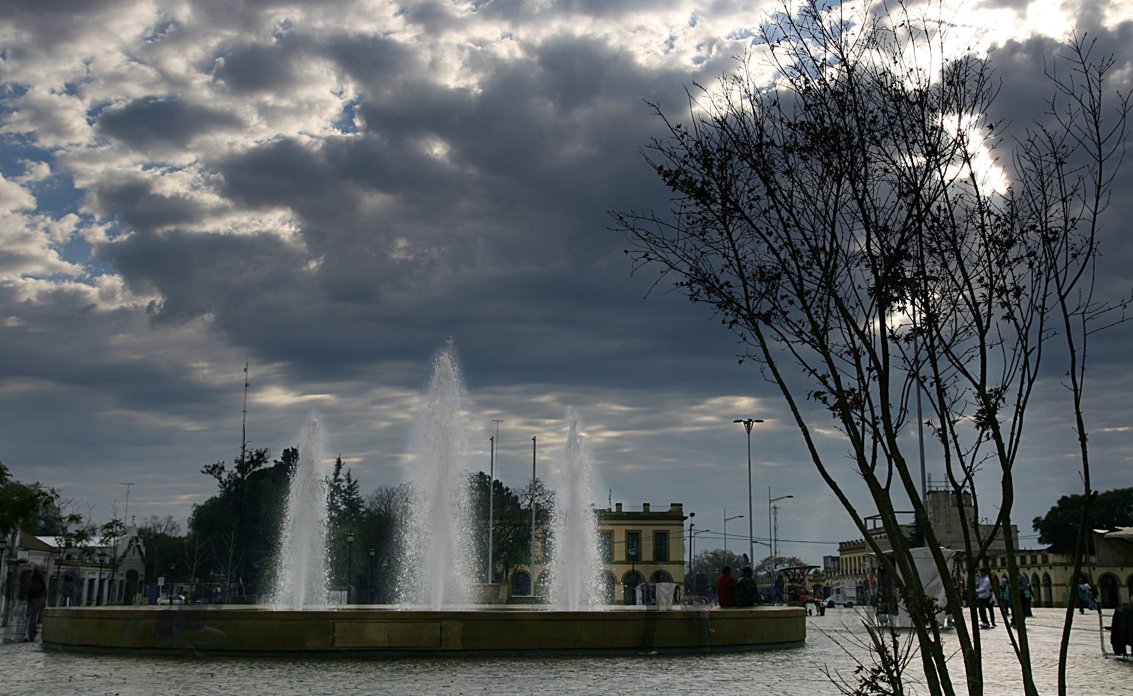 Luján, provincia de Buenos Aires, Argentina.